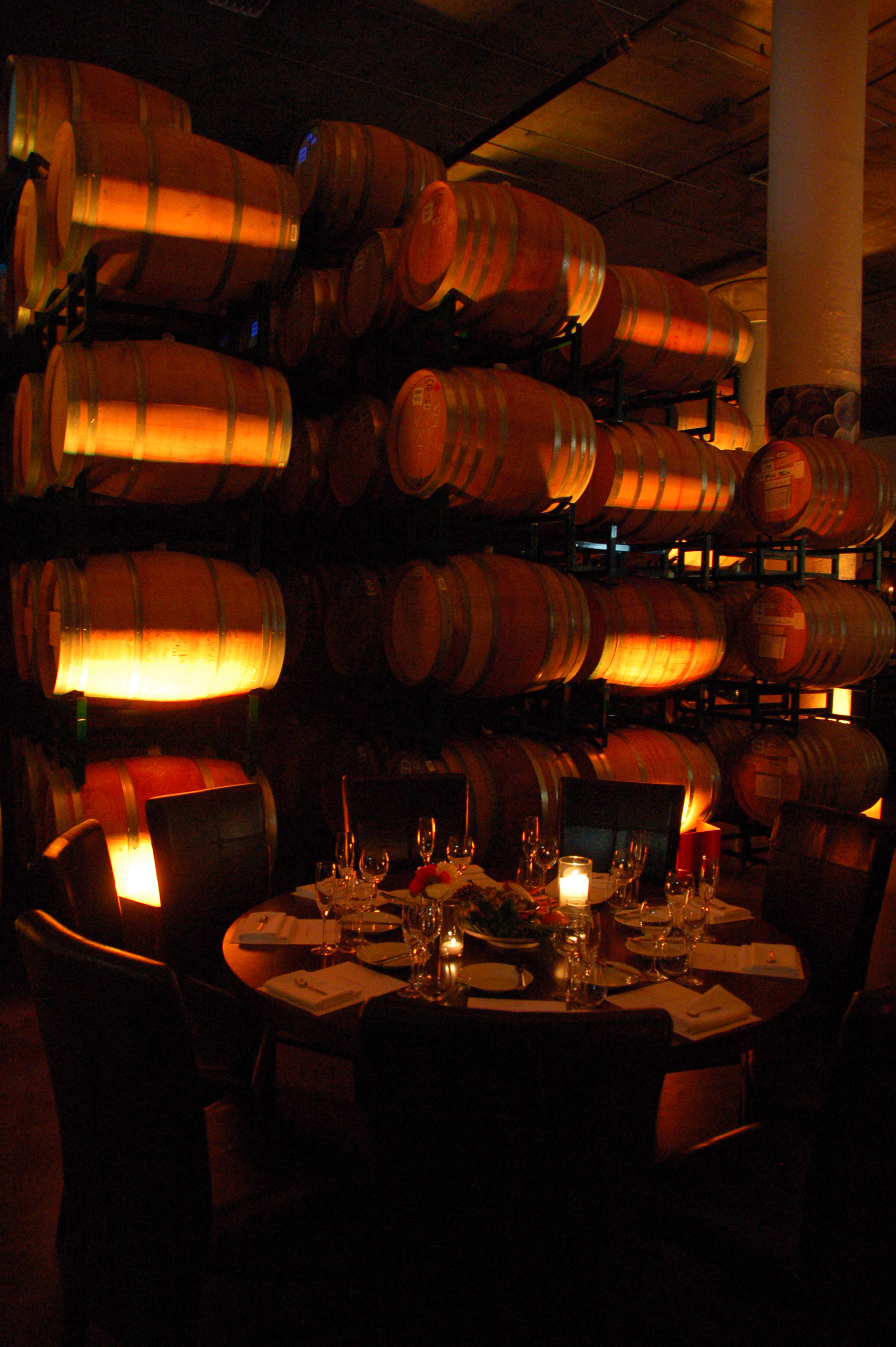 Micro-vinifications chez Crushpad